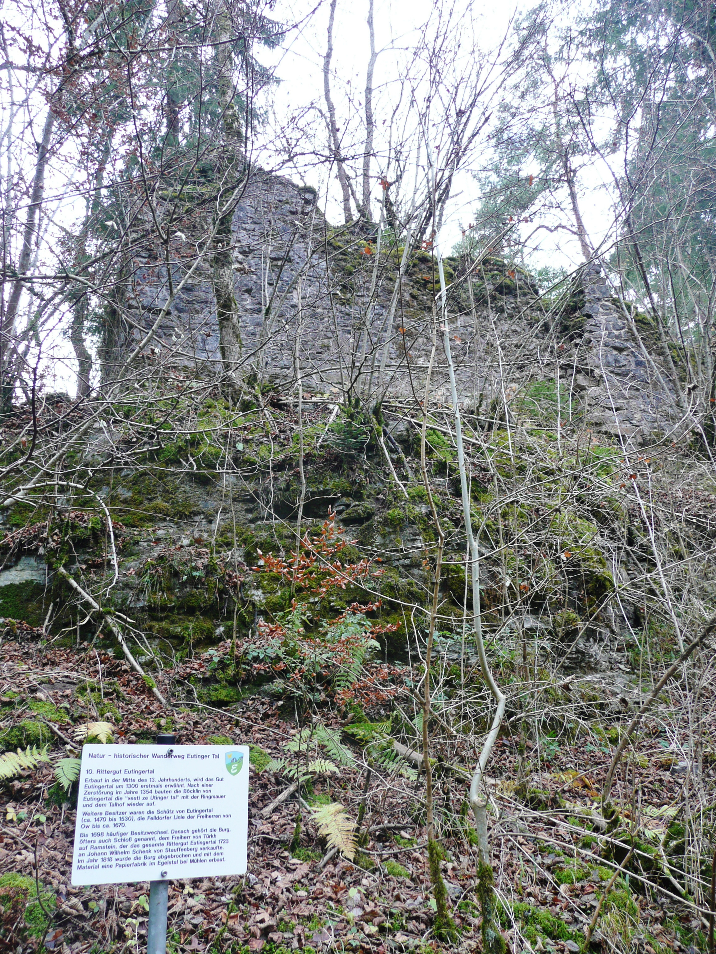 Rittergut Eutinger Tal: Erbaut in der Mitte des 13. Jahrhunderts: Wiederaufgebaut 1354 durch Böcklin von Eutingertal und z. B. 1818 wurde die Burg abgebrochen und mit dem Material eine Papierfabrik im Egelsta gebaut.